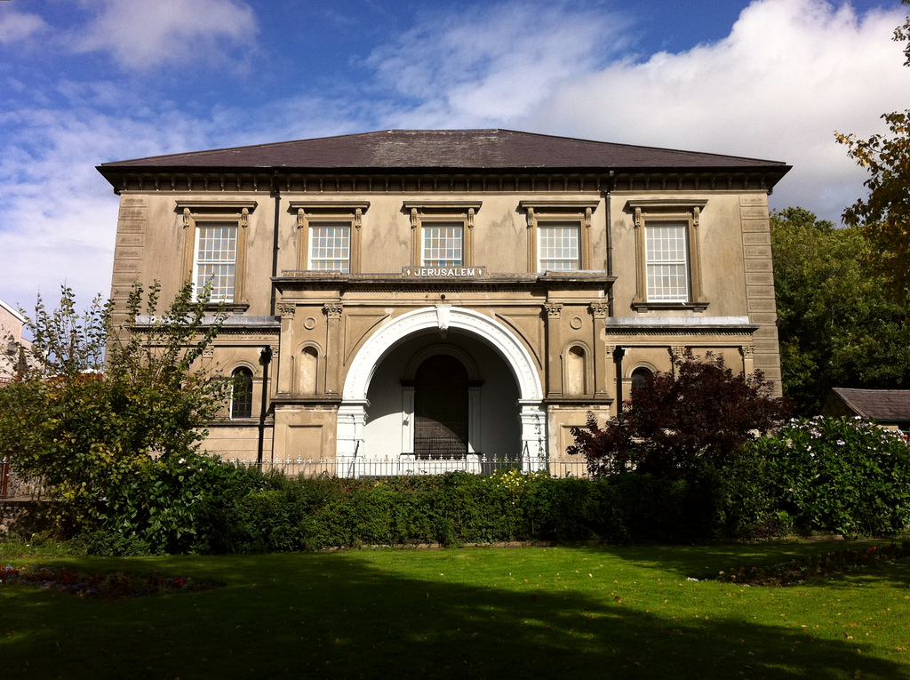 Bethesda, Jerusalem Chapel